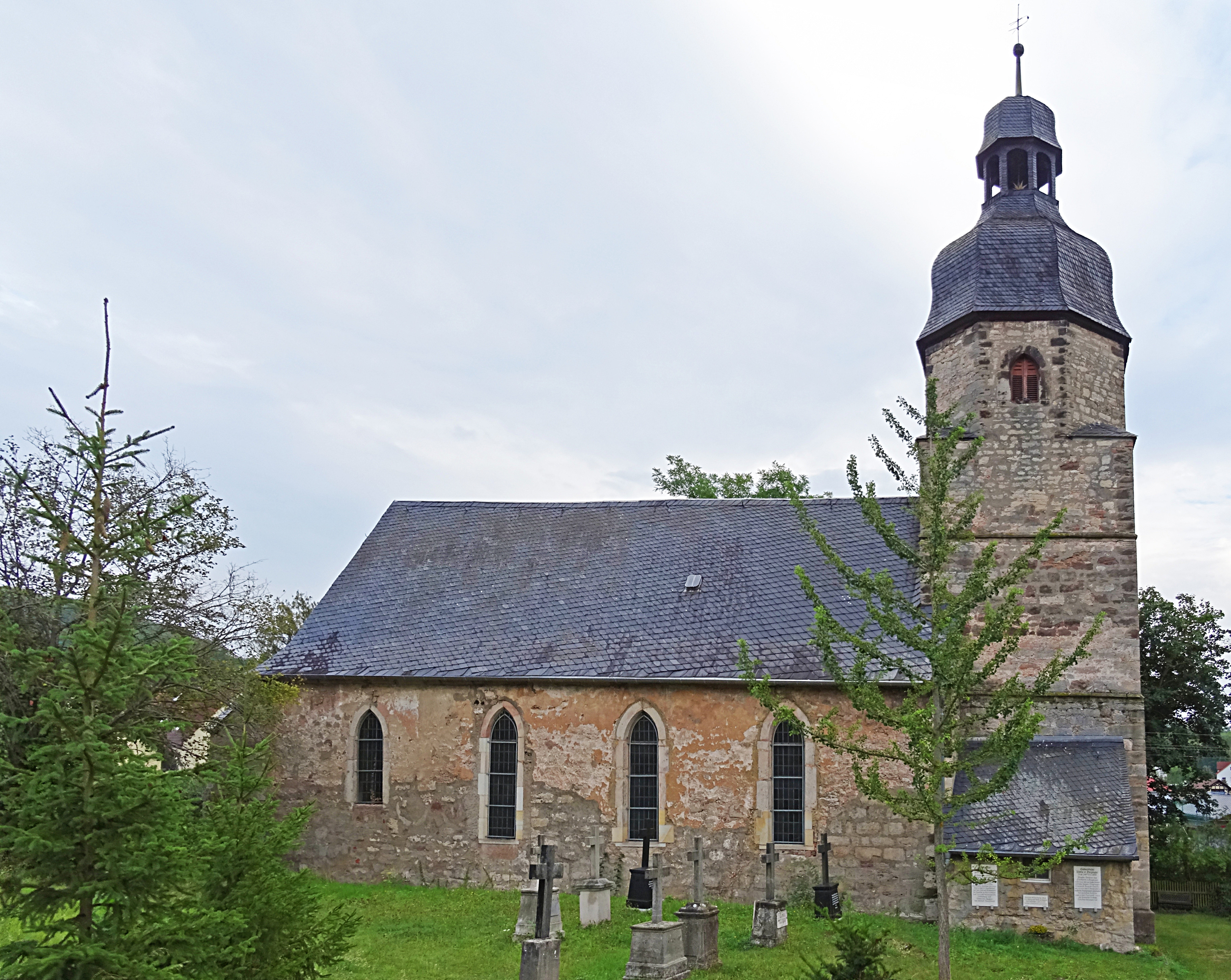 Auferstehungskirche Drackendorf mit historischen Gräbern der Gutsherren von Ziegesar und von Helldorf